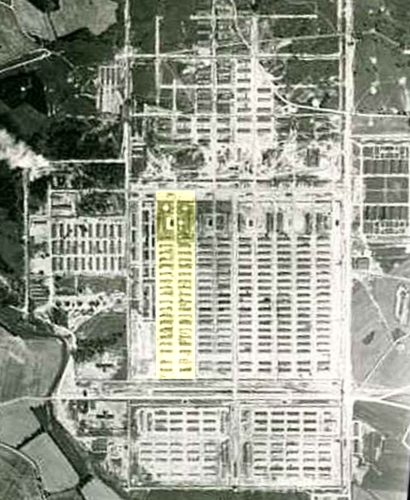 KZ Auschwitz-Birkenau hervorgehoben Block BIIe ("Zigeunerlager")